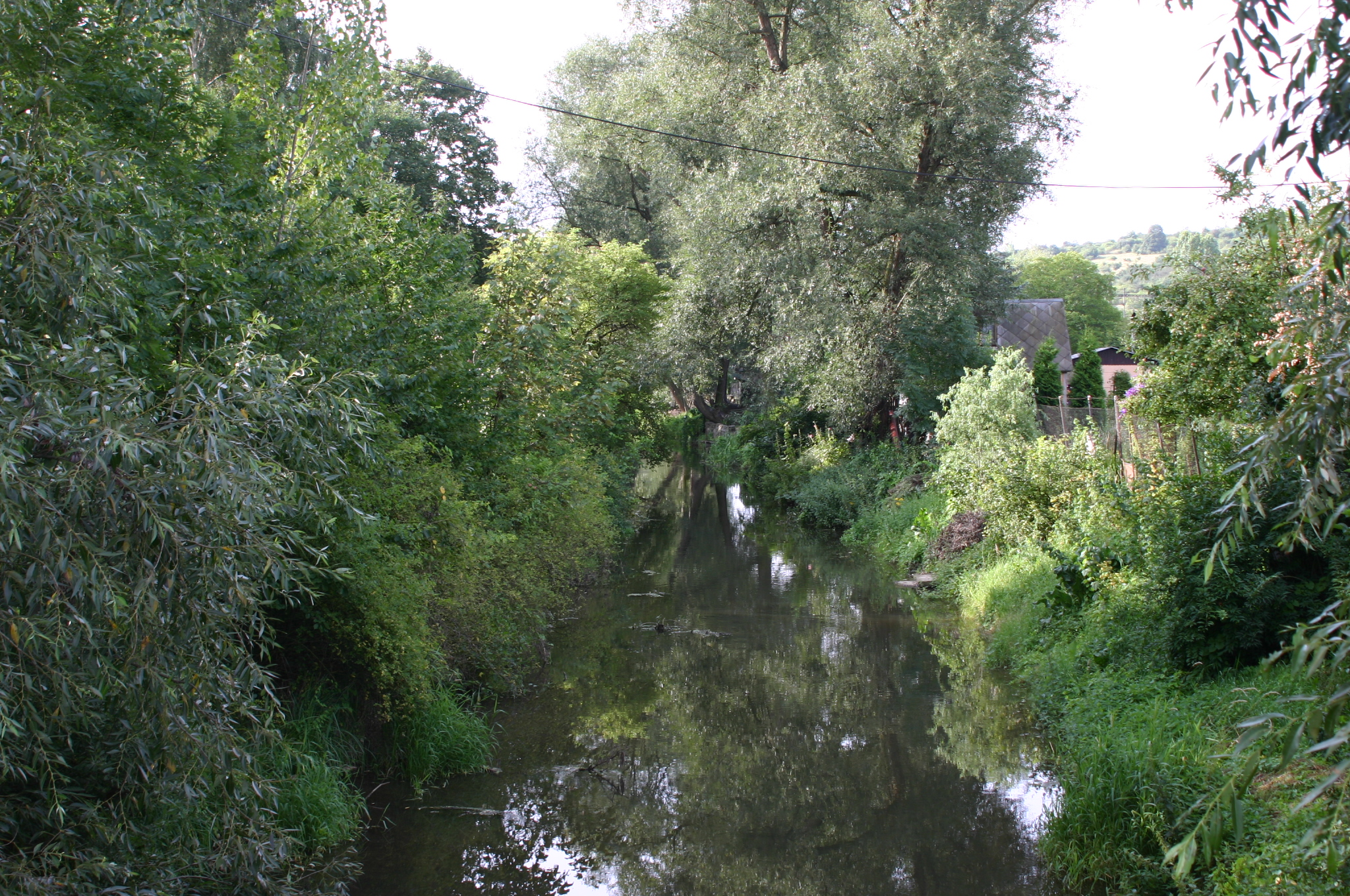 Řeka Srpina u Patokryjí v okrese Most